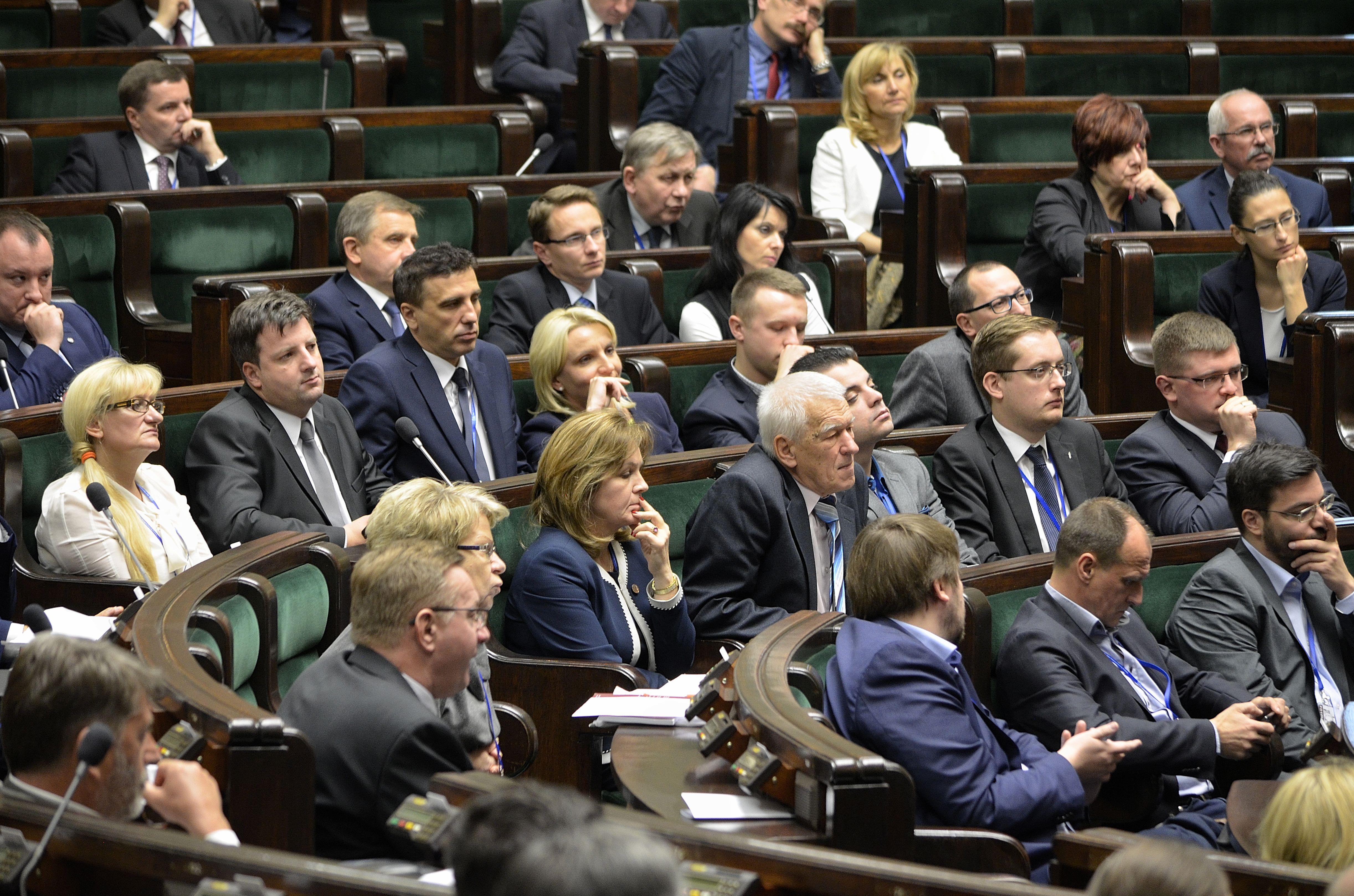 Szkolenie dla nowo wybranych posłów VIII kadencji zorganizowane przez Kancelarię Sejmu